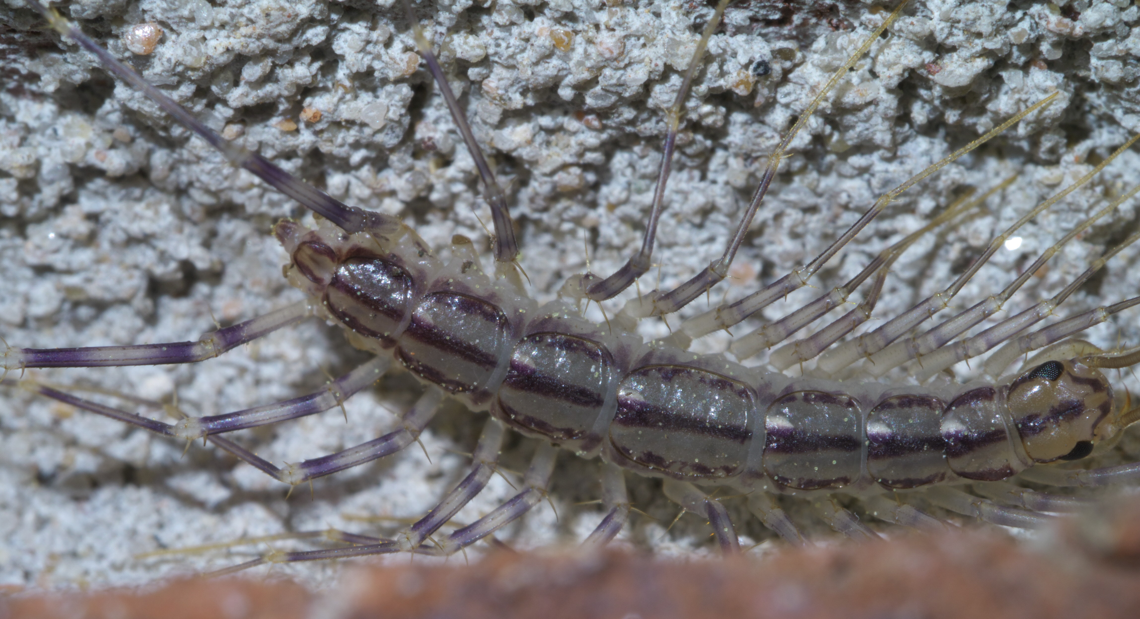 Scutigera coleoptrata, house centipede, ID Confidence: 94